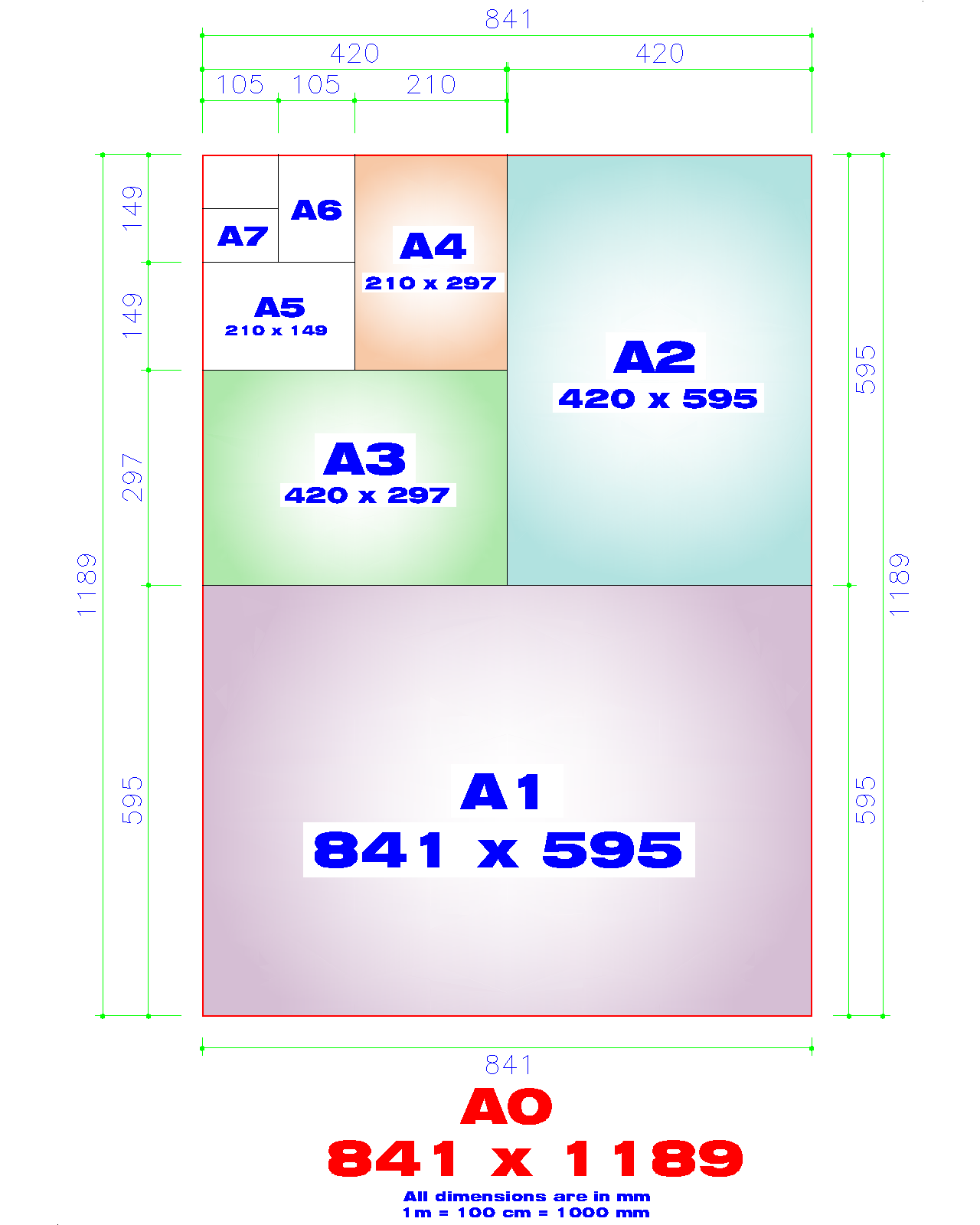 കടലാസ് വലിപ്പം